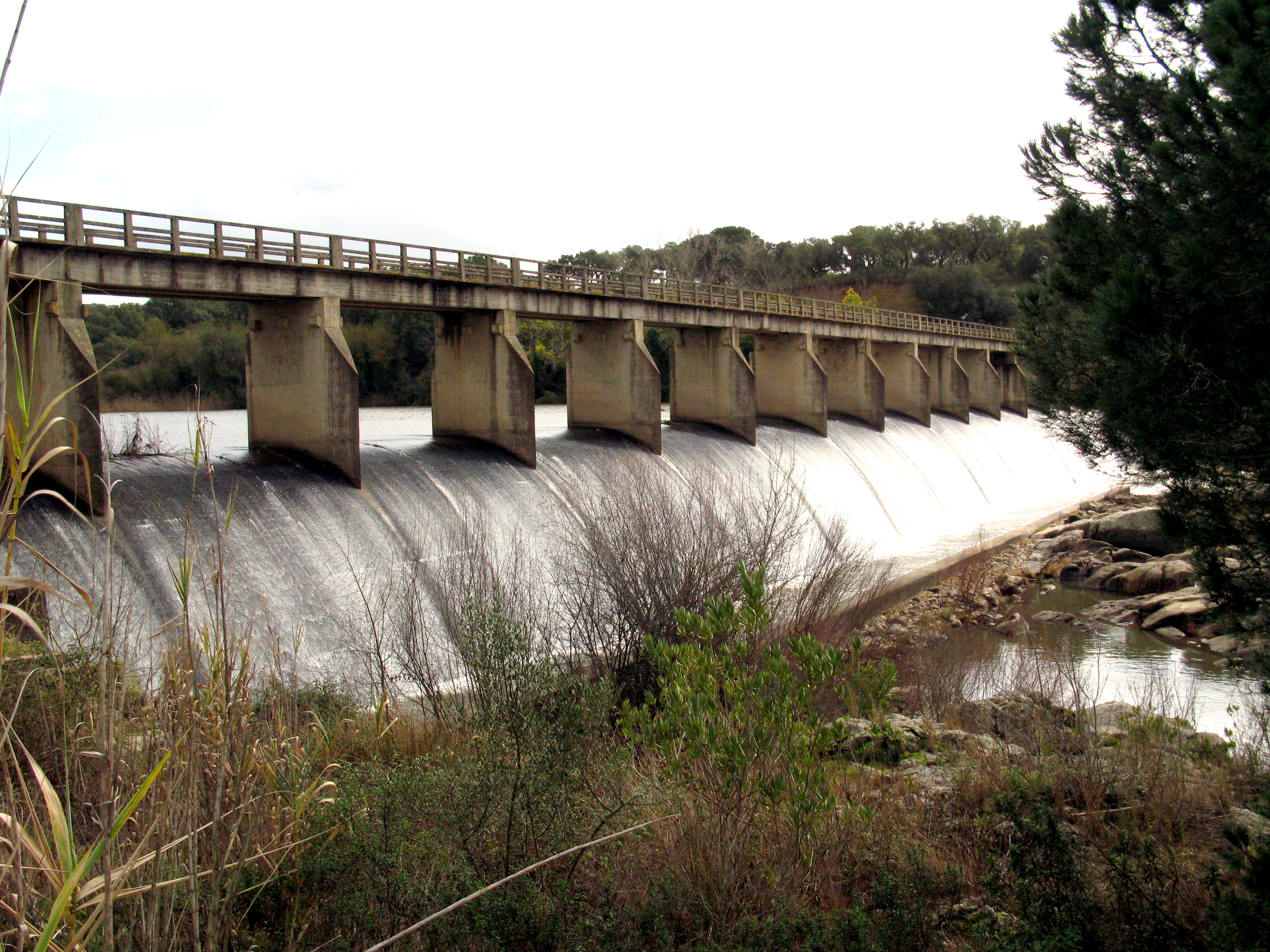 De Staudamm vum rietsen Uwänner gesinn